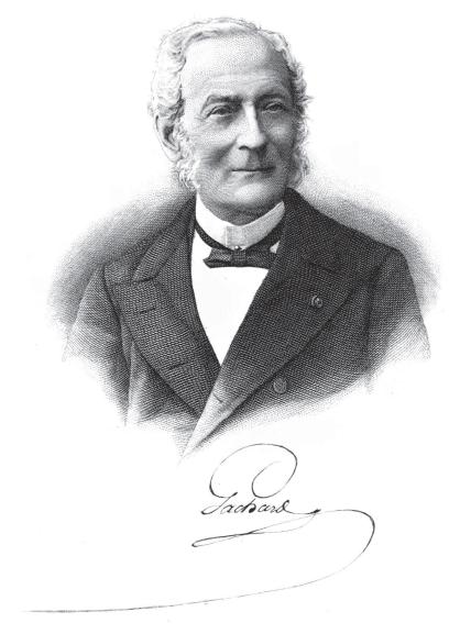 Algemeen rijksarchivaris Louis-Prosper Gachard (1800-1885)